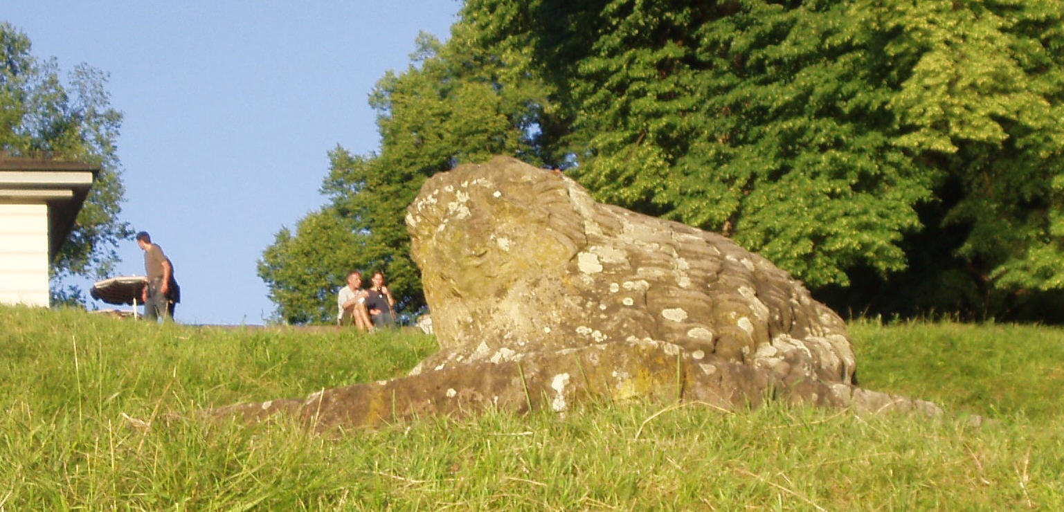 Löwenfigur beim Bärenschlössle